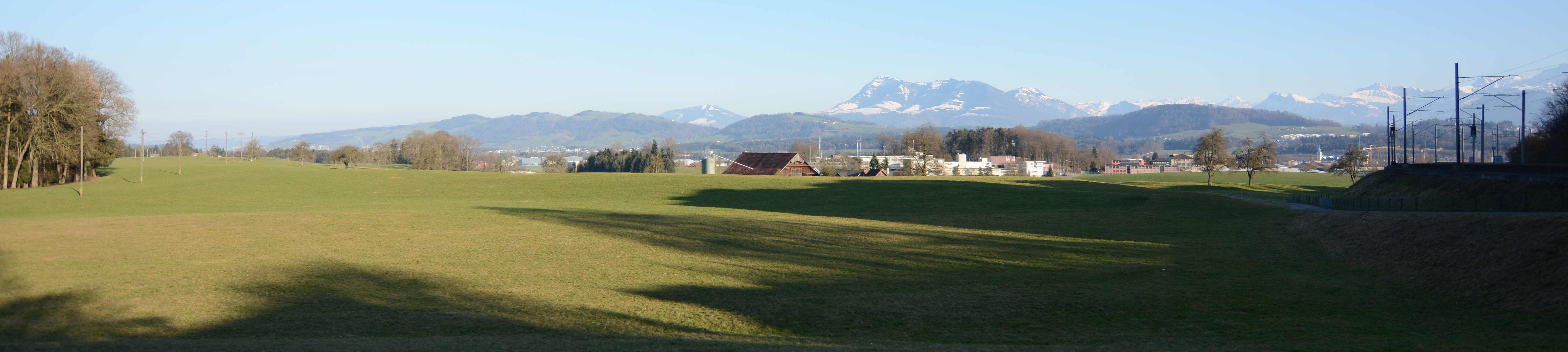 Der Rooterberg von Nordwesten, im Vordergrund Adligen, im Hintergrund der Pilatus